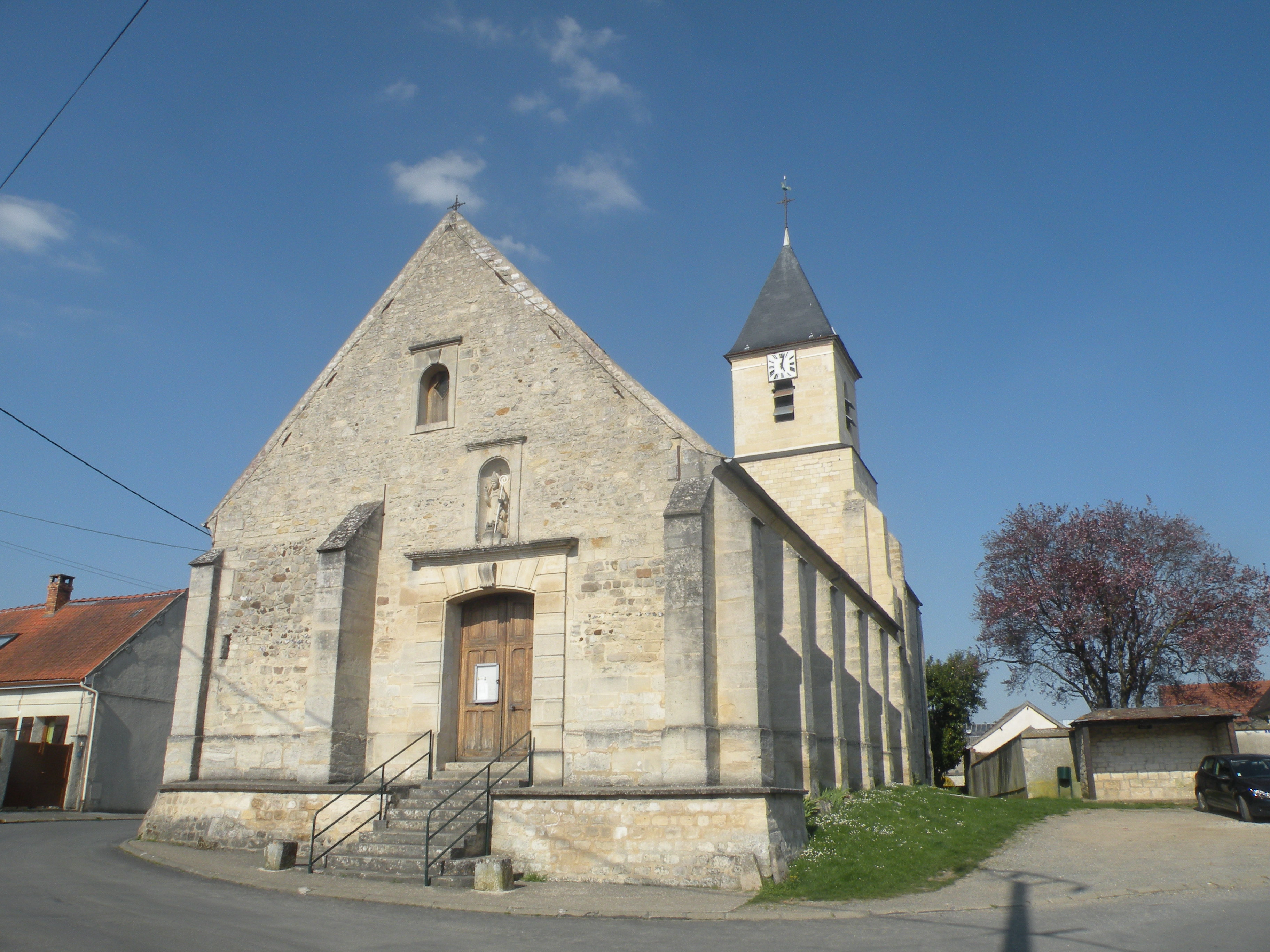 église Saint-Nicolas de Fresnoy-en-Thelle